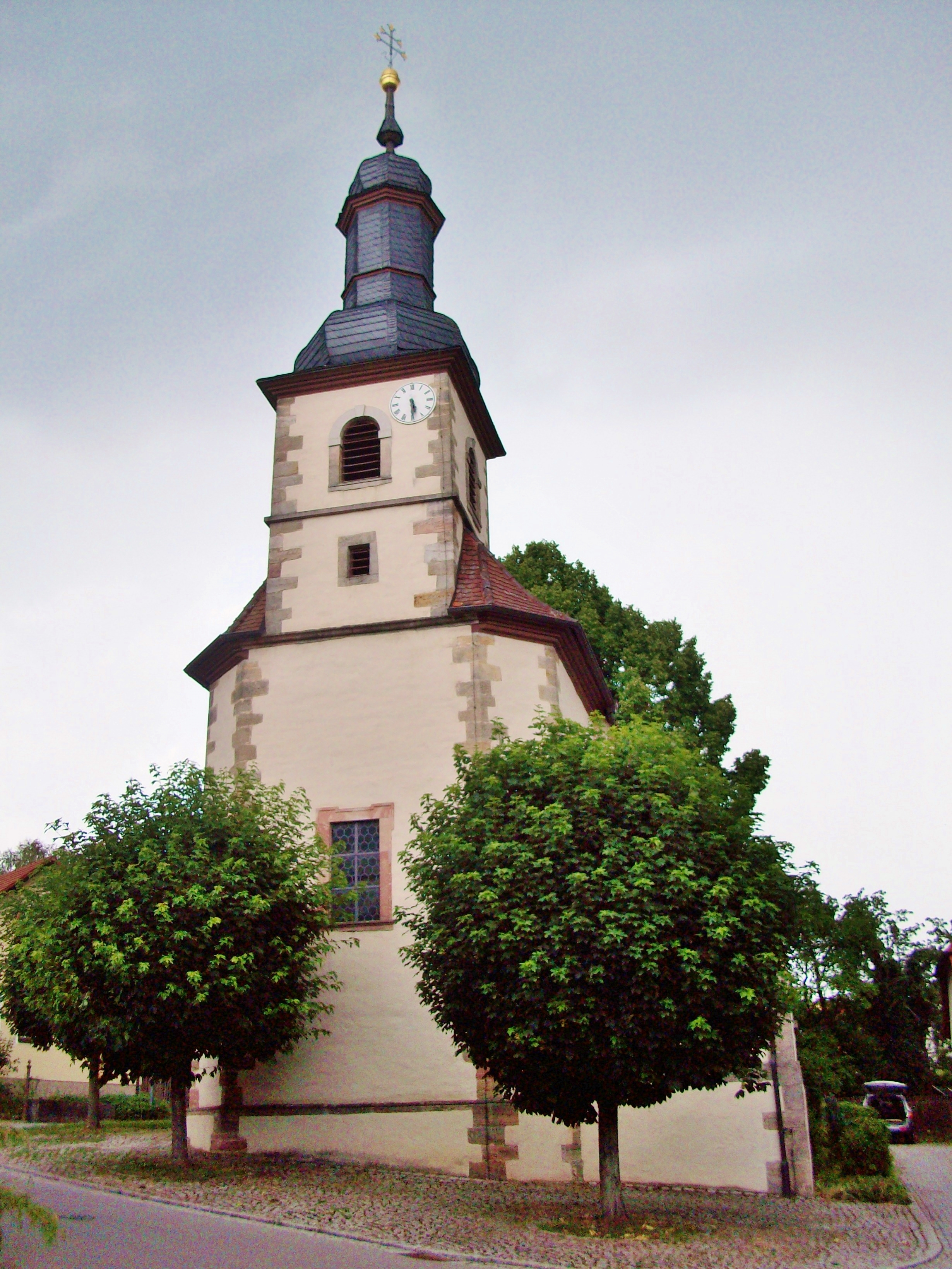 Fladungen in der Rhön: Wendelstraße 13, Katholische Pfarrkirche im Ortsteil Rüdenschwinden